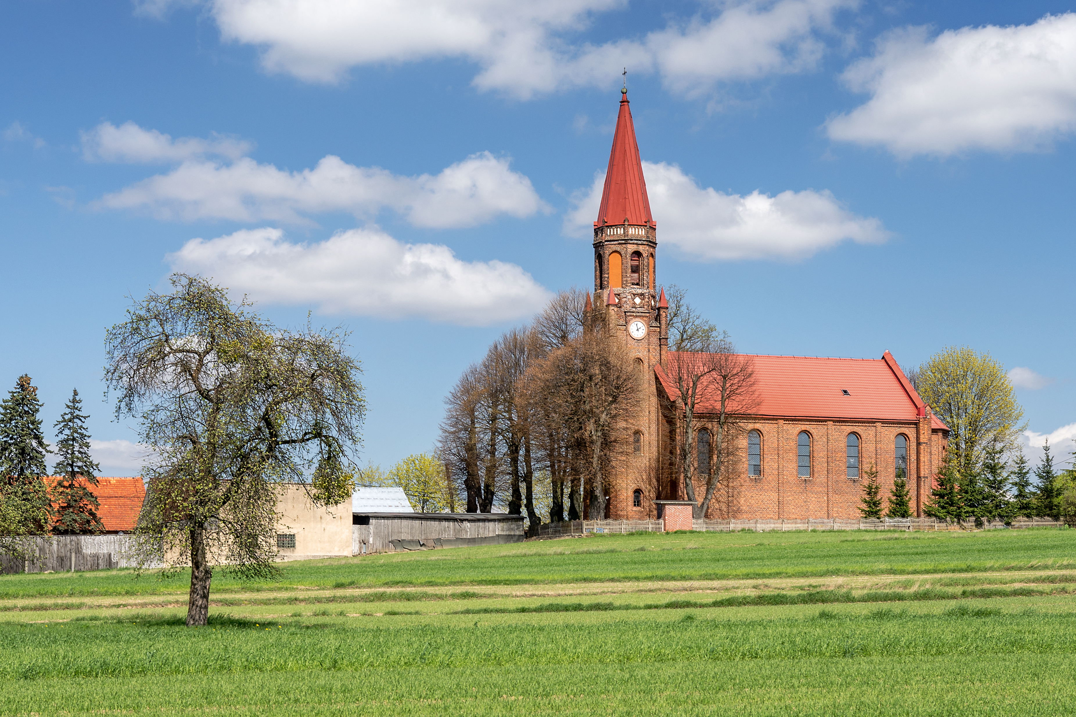 Kościół polskokatolicki Najświętszej Maryi Panny Królowej Polski, Strzyżew, gm. Sieroszewice, pow. ostrowski, woj. wielkopolskie